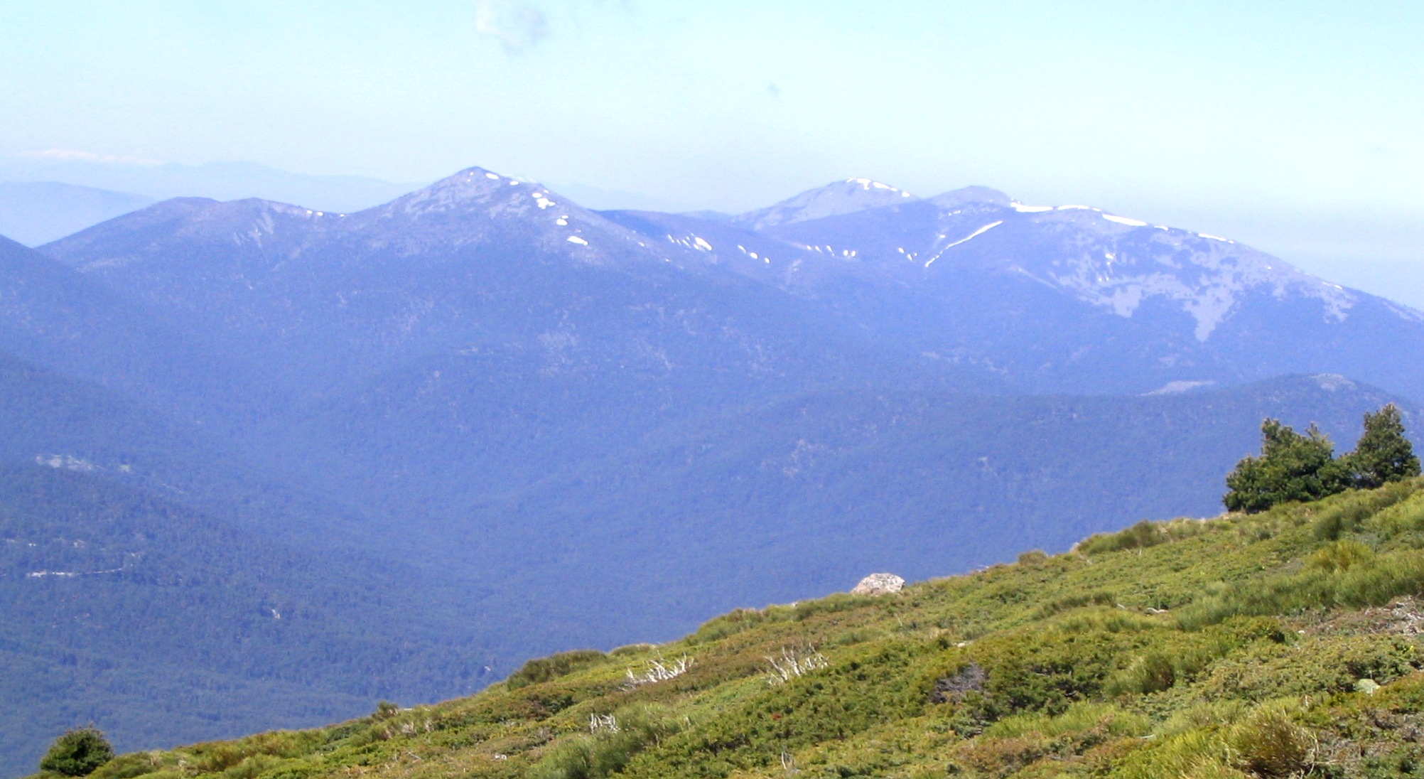 La Mujer Muerta vista desde Peñalara (España).